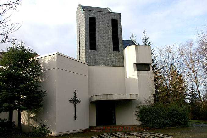 Witten-Mitte, Lukas-Zentrum, Diakoniegelände in Witten, Stadtteil Mitte (Stadtteilbezirk / statistischer Bezirk "Stadion")